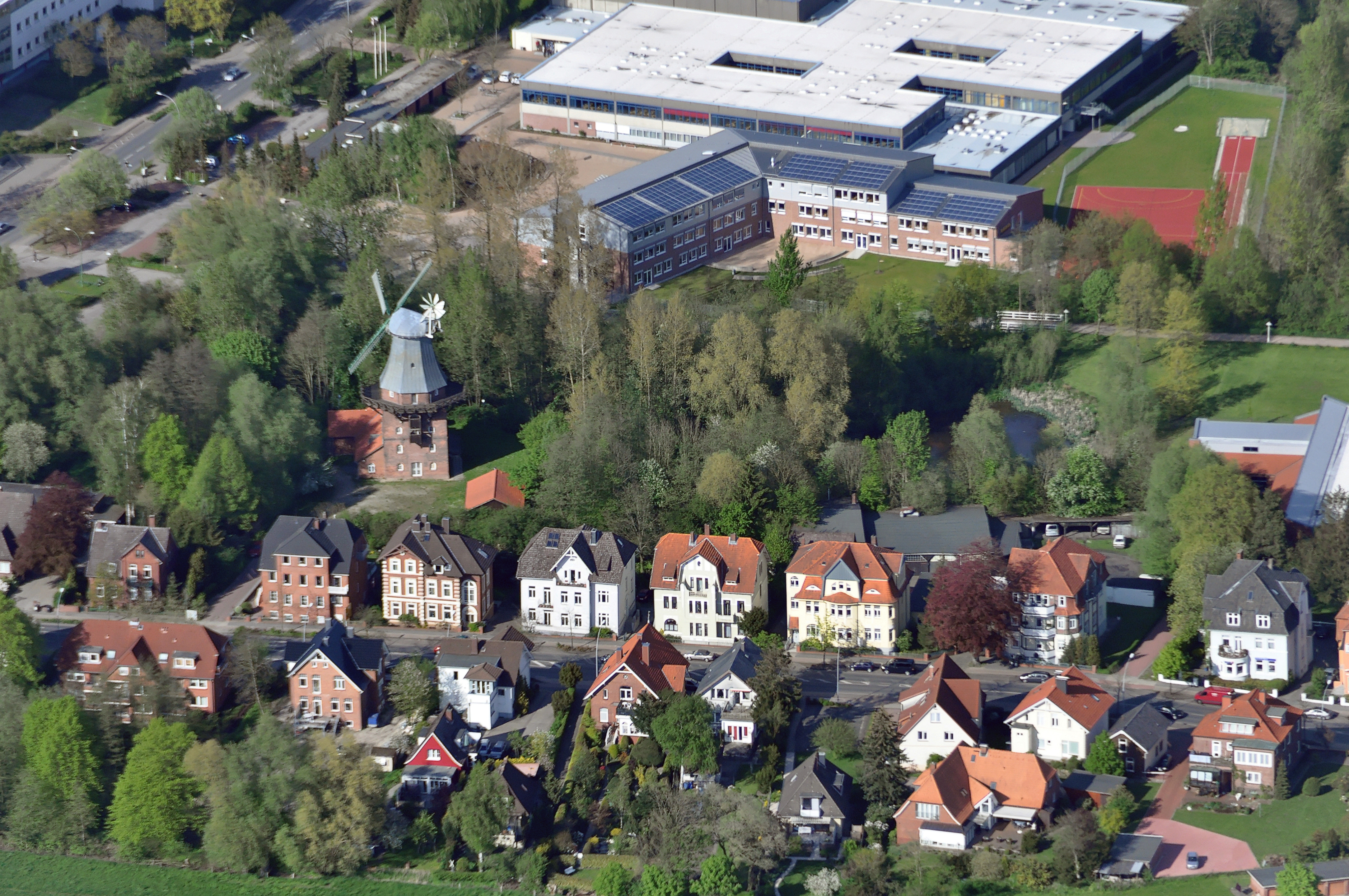 Luftbilder von der Nordseeküste 2012-05